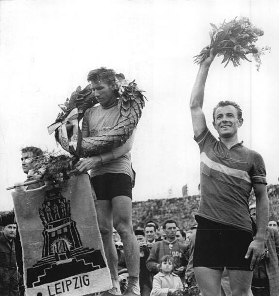 Gazda, Tscherepowitsch, Moiceanu Zentralbild Wendorf 12.5.1961XIV. Internationale Friedensfahrt Warschau-Berlin-Prag 1961. 8. Etappe von Berlin nach Leipzig am 10.5.61.UBz. Siegerehrung im Zentralstadion zu Leipzig. vlnr: Gazda (Polen, 2. Platz) Tscherepowitsch (UdSSR, 1. Platz) Moiceanu (Rumänien, 3. Platz)